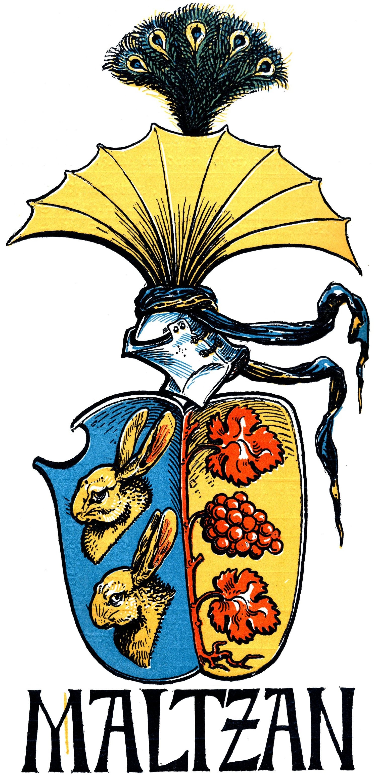 Wappen derer von Maltzan/Maltzahn